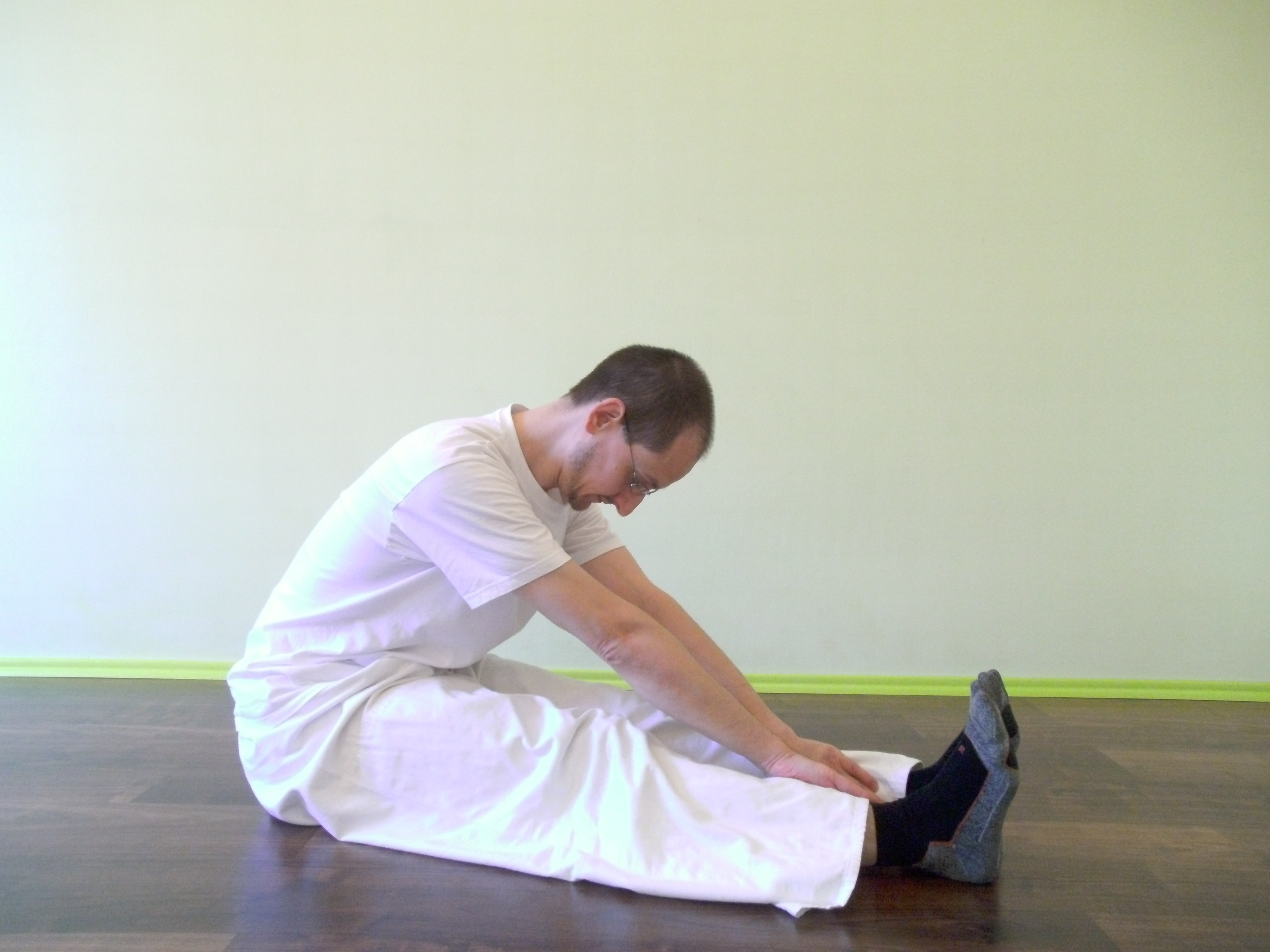 Makko Ho Übung für Blasen- und Nierenmeridian Alternative